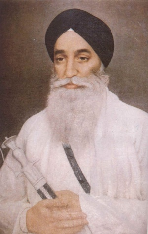 ਪੰਜਾਬੀ: ਗਿਆਨੀ ਗੁਰਦਿਆਲ ਸਿੰਘ ਜੀ ਅਜਨੋਹਾ